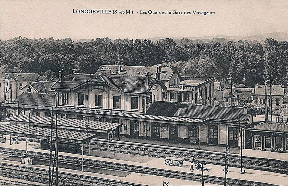 Longueville - Les quais et la gare des voyageurs.